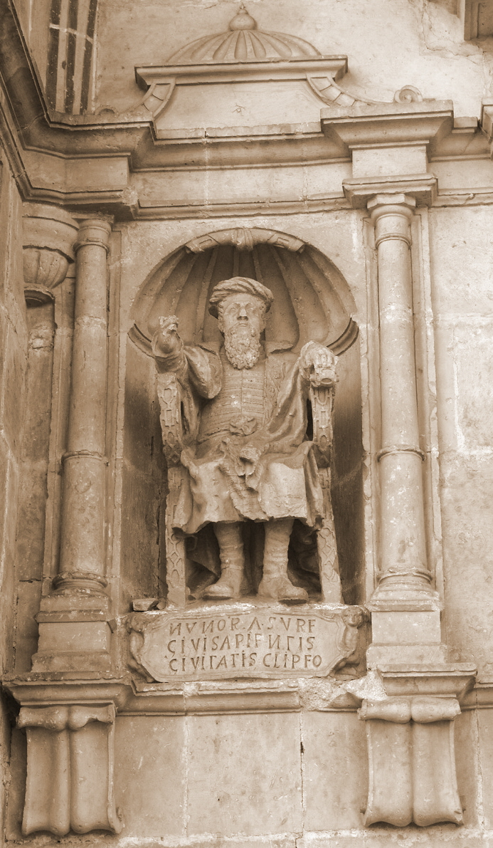 Nuño Rasura, estatua en el pórtico de la iglesia de Bisjueces, Merindades, Burgos, España.